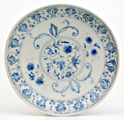 Piatto decorato in bianco e blu. "Porcellana dei Medici". Terzo quarto del XVI secolo.